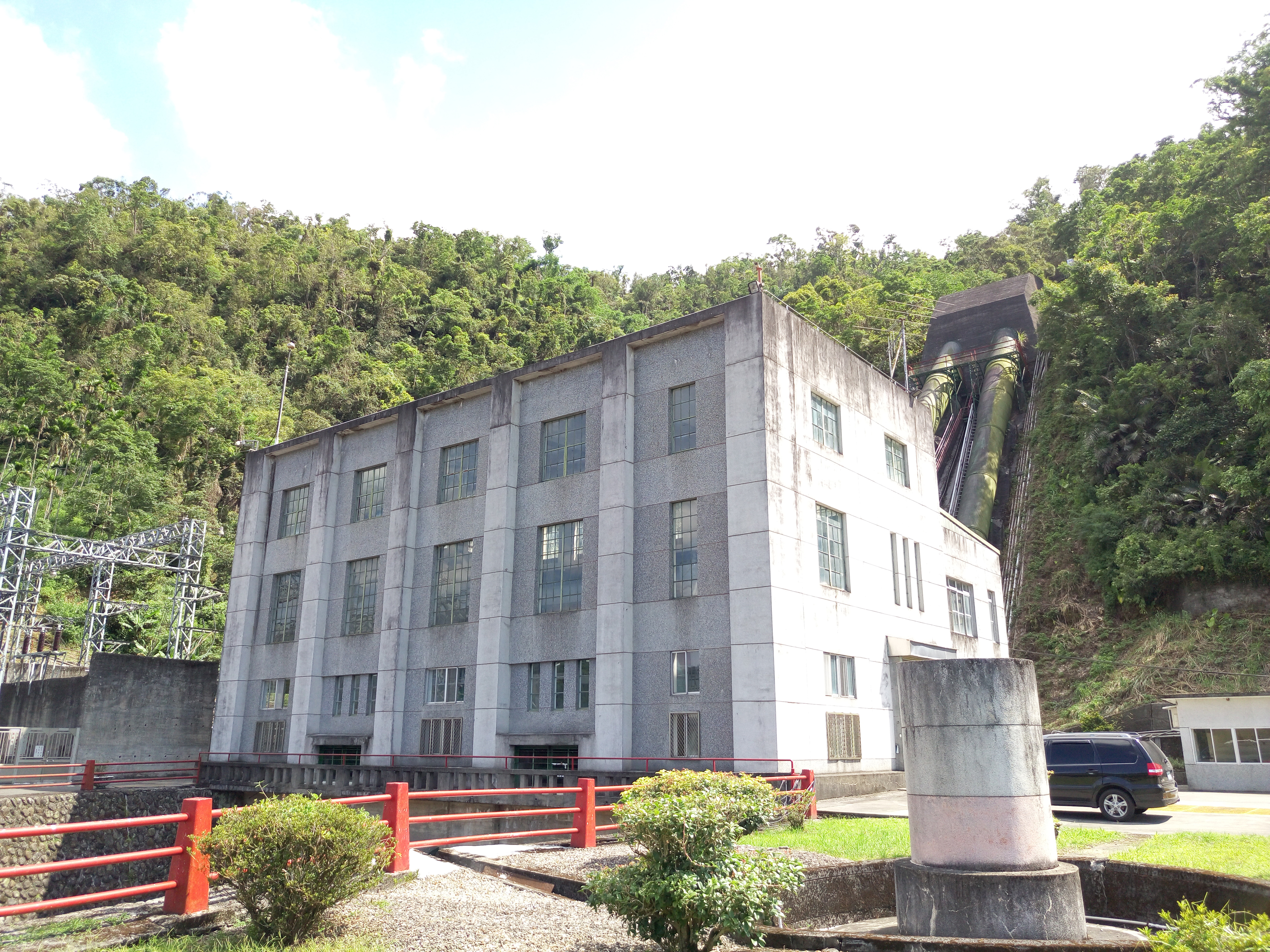 中文（台灣）: 圓山機組廠房外觀